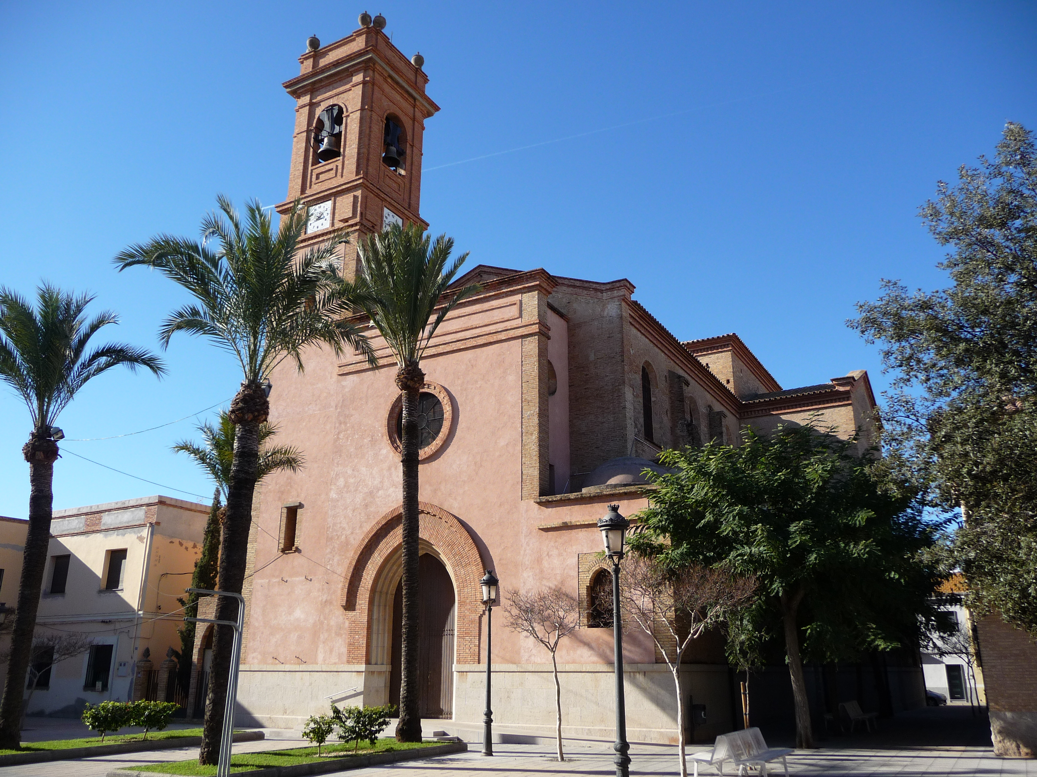 Església de la Mare de Déu del Niño Perdido, a Les Alqueries (provincia de Castelló, Espanya) 06.901-001.